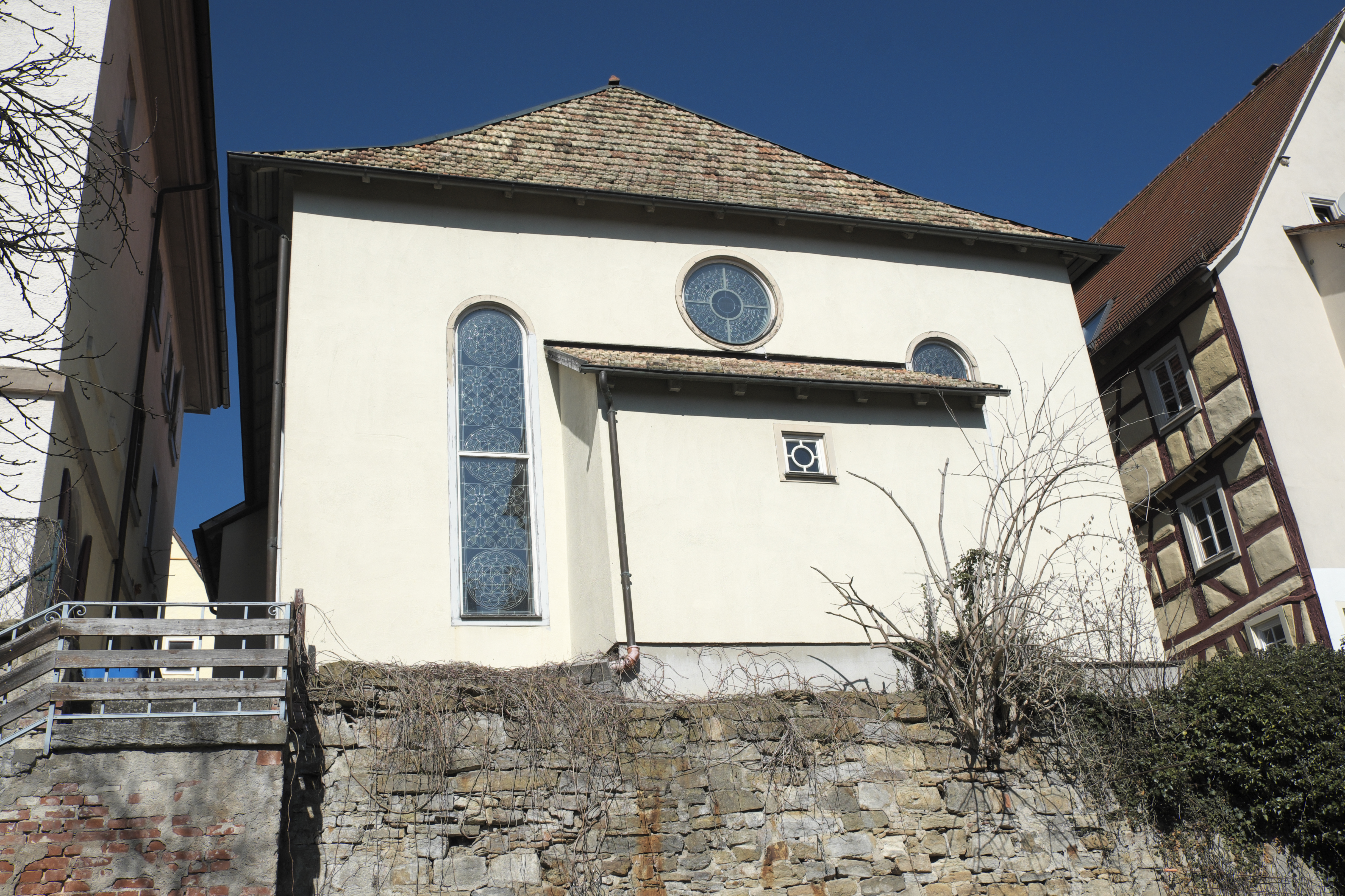 Synagoge (Hechingen) in Hechingen im Zollernalbkreis (Baden-Württemberg/Deutschland), Rückseite